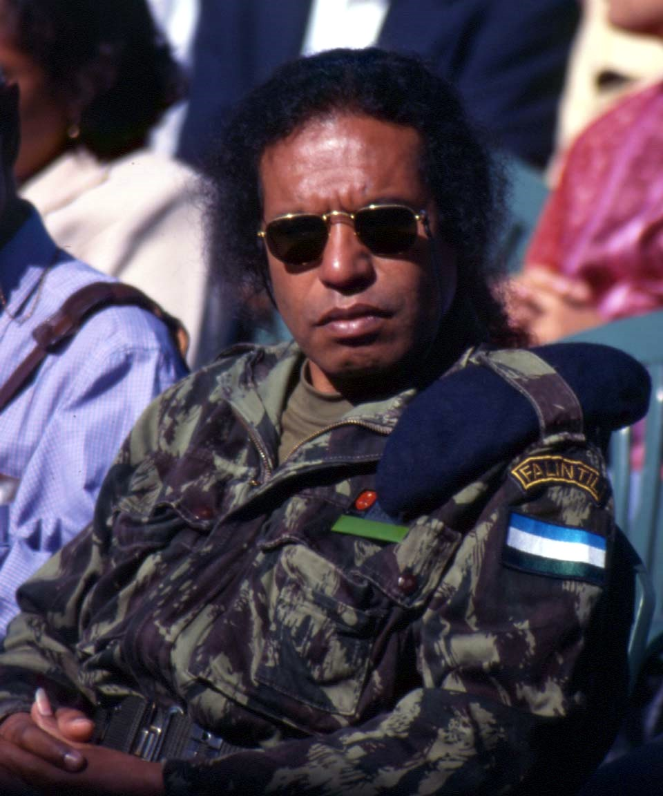 Taur Matan Ruak bei den Feierlichkeiten in Aileu zum 25. Geburtstag der FALINTIL (2000).